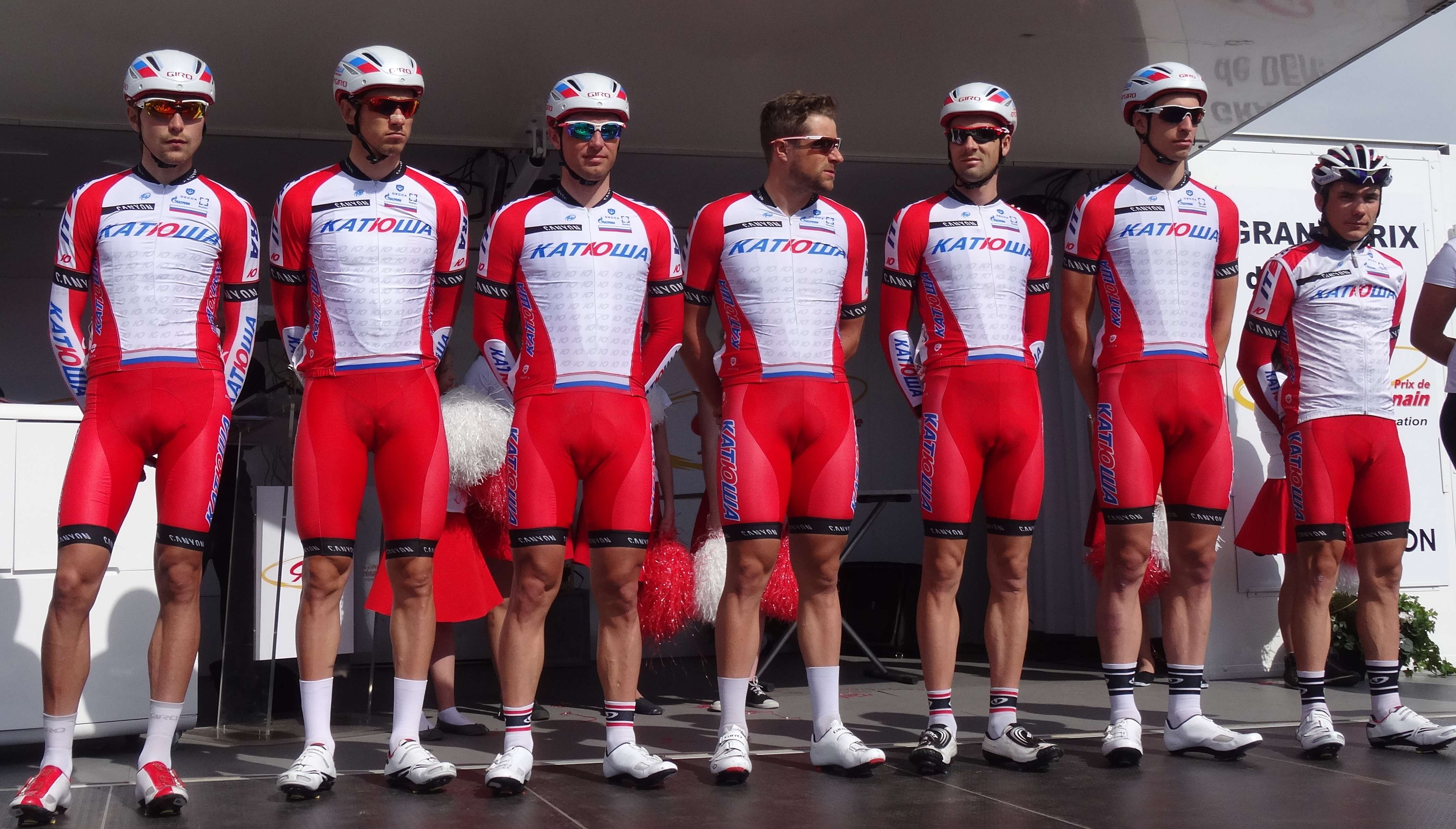 Reportage réalisé le jeudi 17 avril à l'occasion du départ et de l'arrivée du Grand Prix de Denain 2014 à Denain, Nord, Nord-Pas-de-Calais, France.